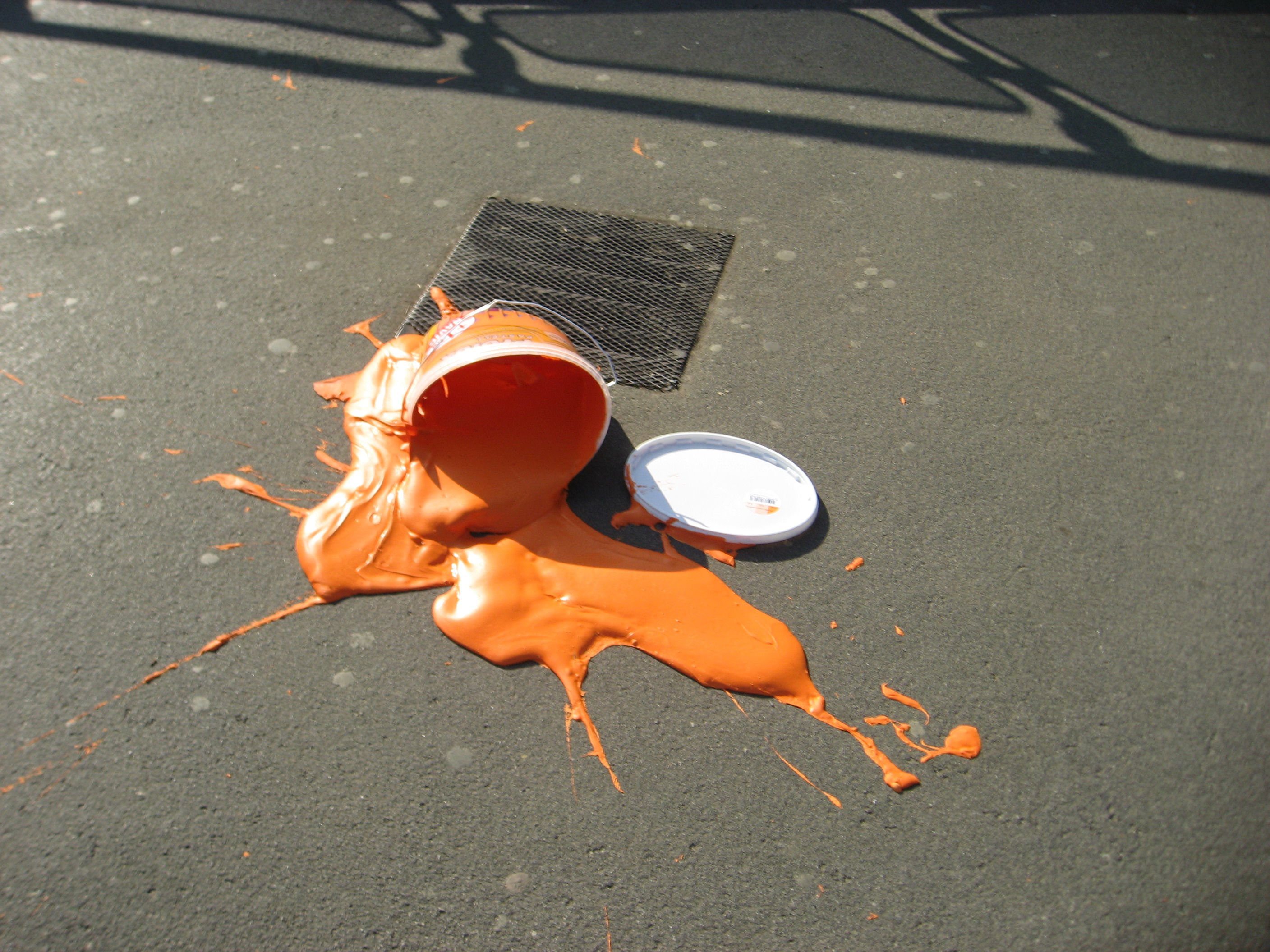 Rozlitá oranžová barva, Černý Most